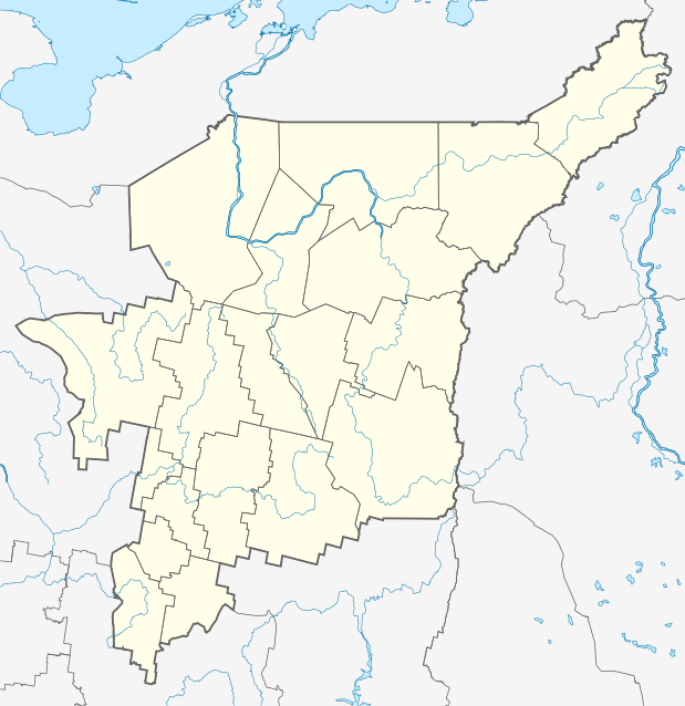 Республика Коми (Россия), административная карта. Координаты границ: E 44.9 66.7 N 58.9 68.7 Координаты для GMT: -R44.9/66.7/58.9/68.7 Инструменты: GMT, Inkscape This map may be incomplete, and may contain errors. Don't rely solely on it for navigation.